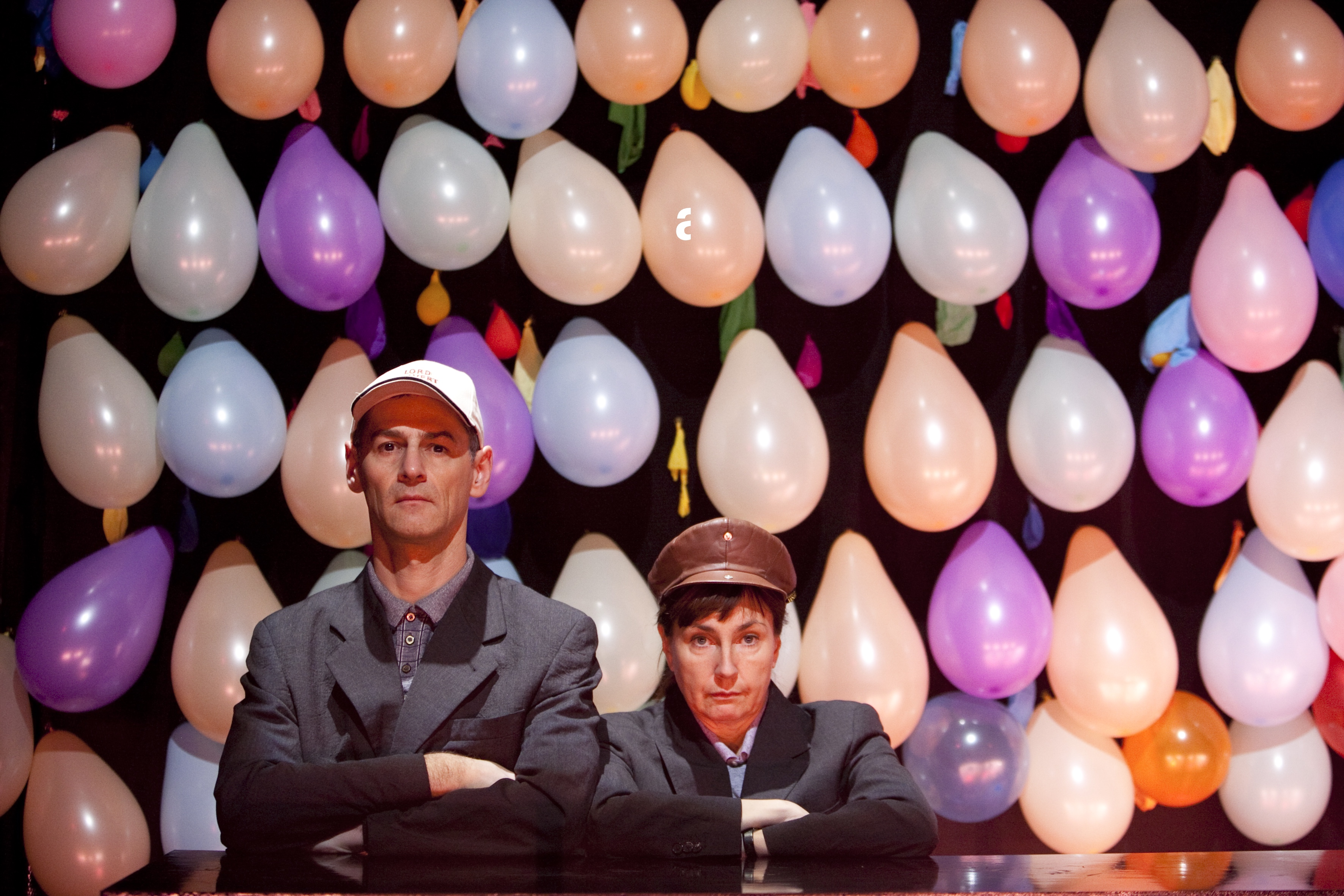 Carina Reich & Bogdan Szyber som sig själva i den sista delen av Den Melankoliska Trilogin "Unknown Pleasures", Orionteatern 2009.